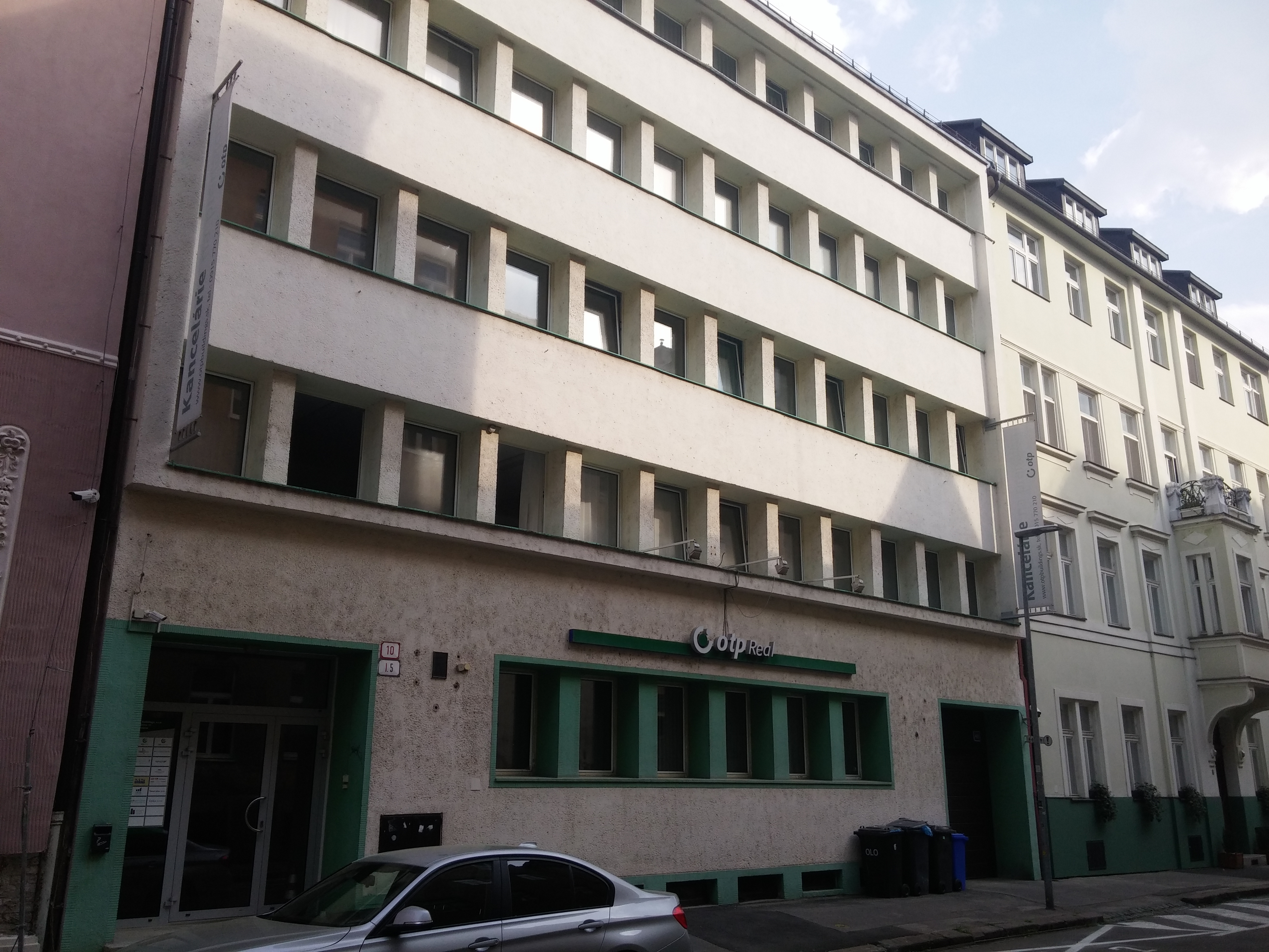 Tallerova 10, Staré Mesto, Bratislava